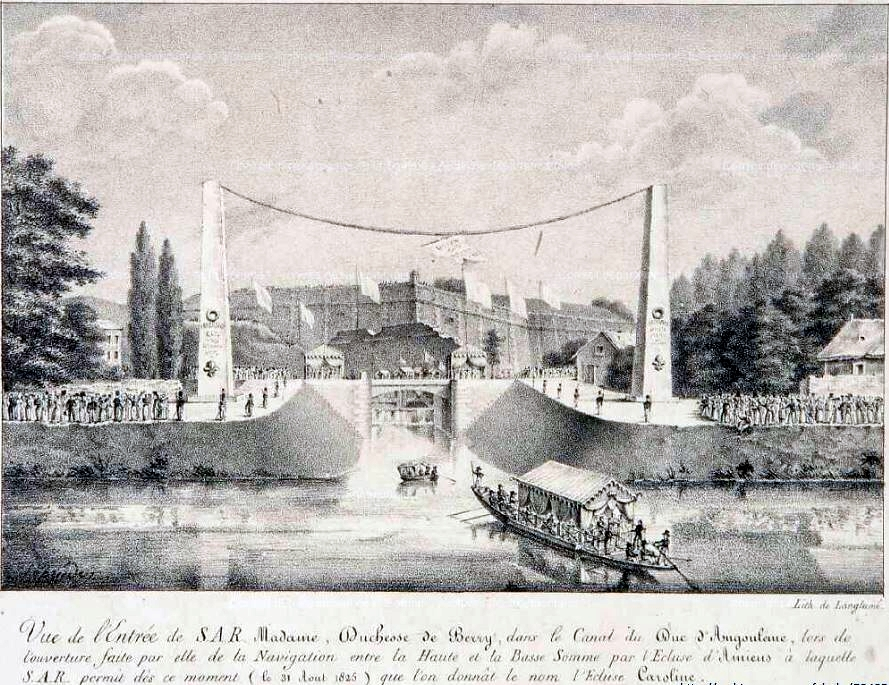 Inauguration de l'écluse d'Amiens sur le canal du Duc d'Angoulême, le 31 août 1825, par la Duchesse de Berry.